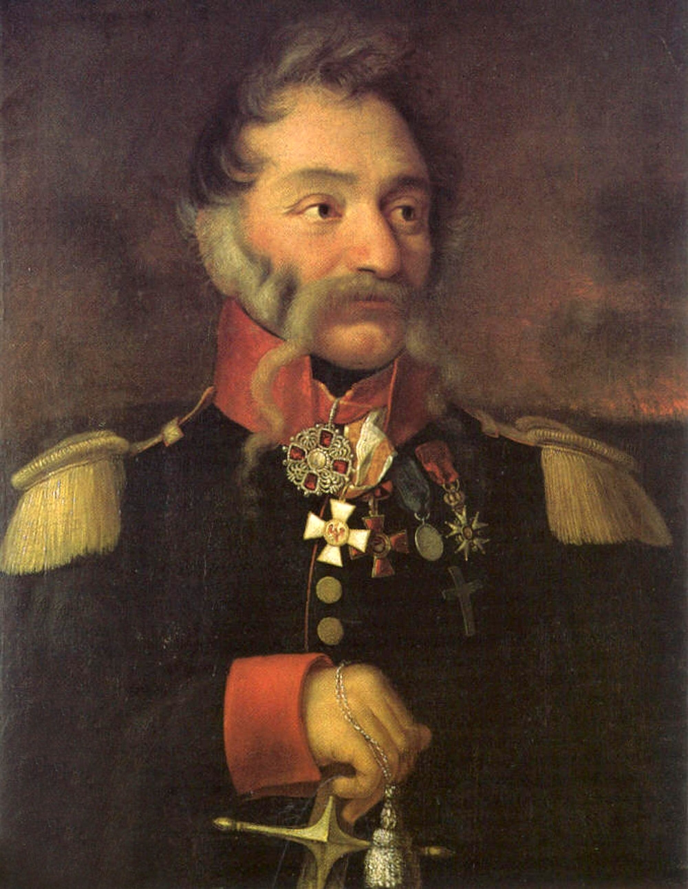 Porträt Victor von Prendel, Stadtkommandant von Leipzig 1813/1814